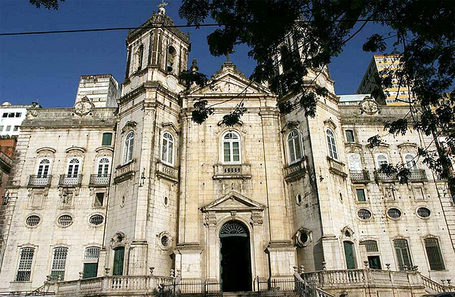 Basílica de Conceição da Praia, feita em Lioz, na Cidade Baixa, em Salvador da Bahia.